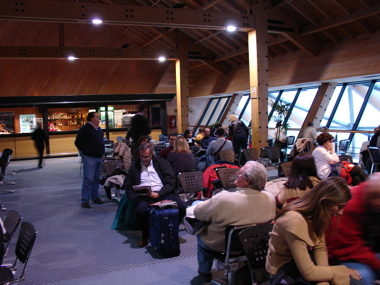 Sala de preembarque Preembarque del Aeropuerto de Ushuaia